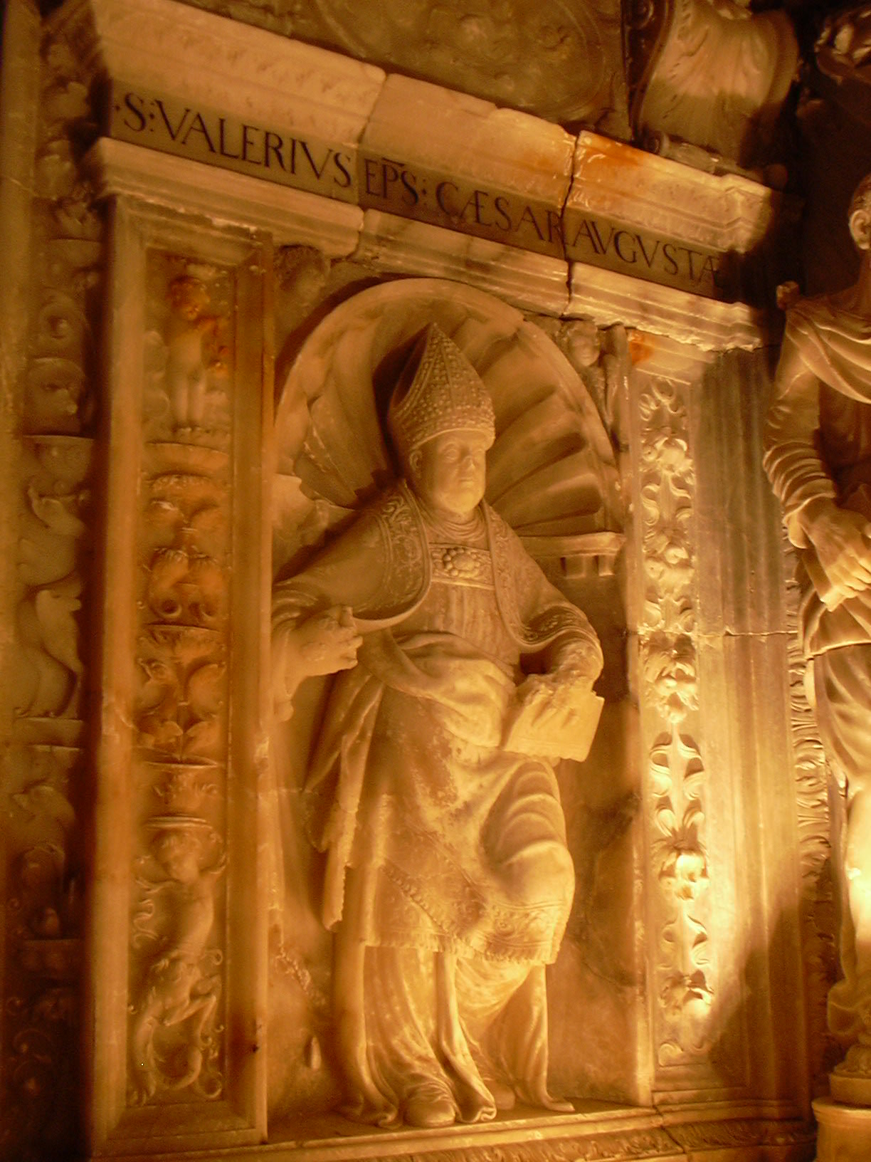 Veruela - Sepulcro del abad Lope Marco - Detalle San Valero - Atribuido a Pedro de Moreto h. 1552-1553